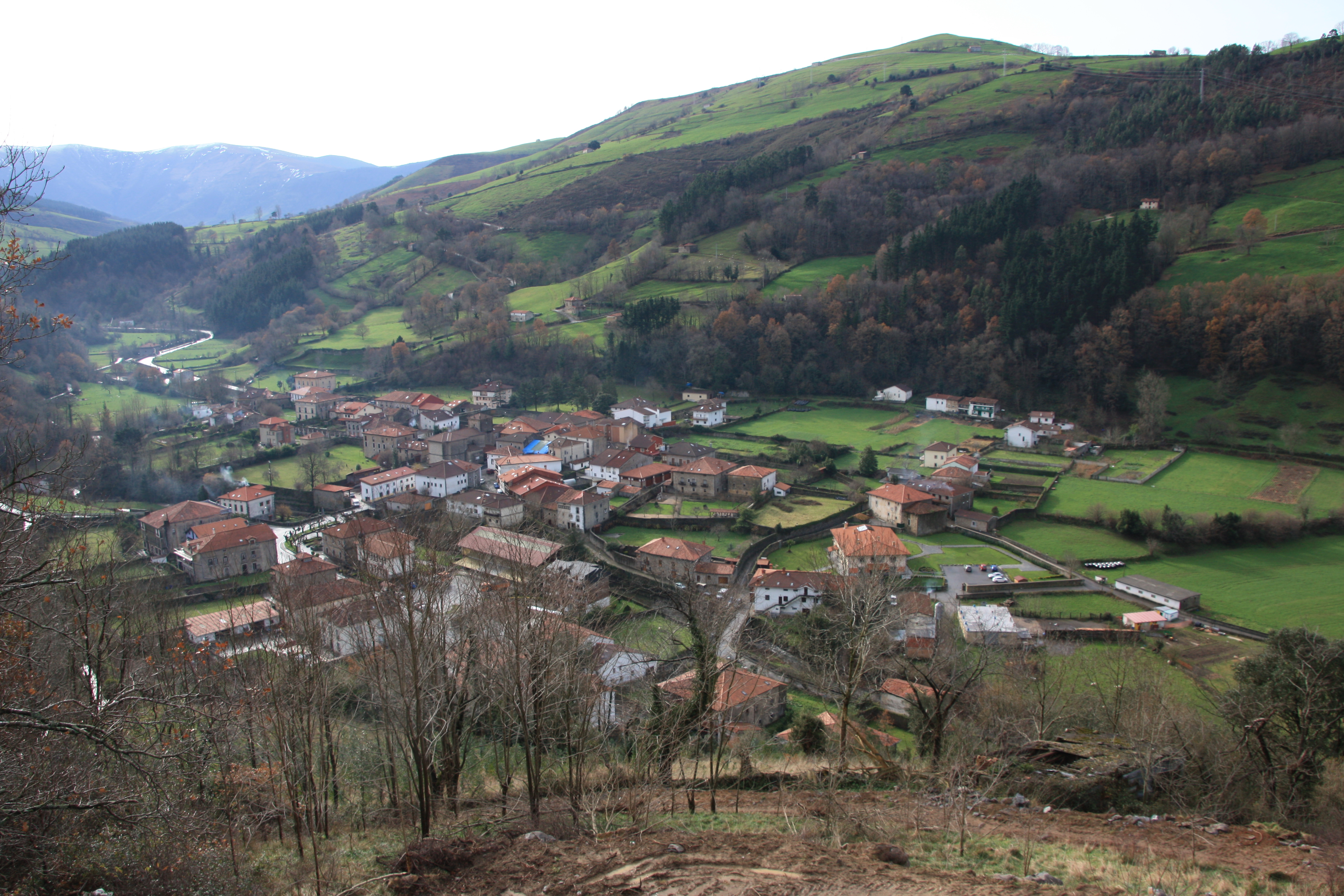 Lanestosa udalerria, Bizkaia, Euskal Herria - Lanestosa village, Biscay, Basque Country.